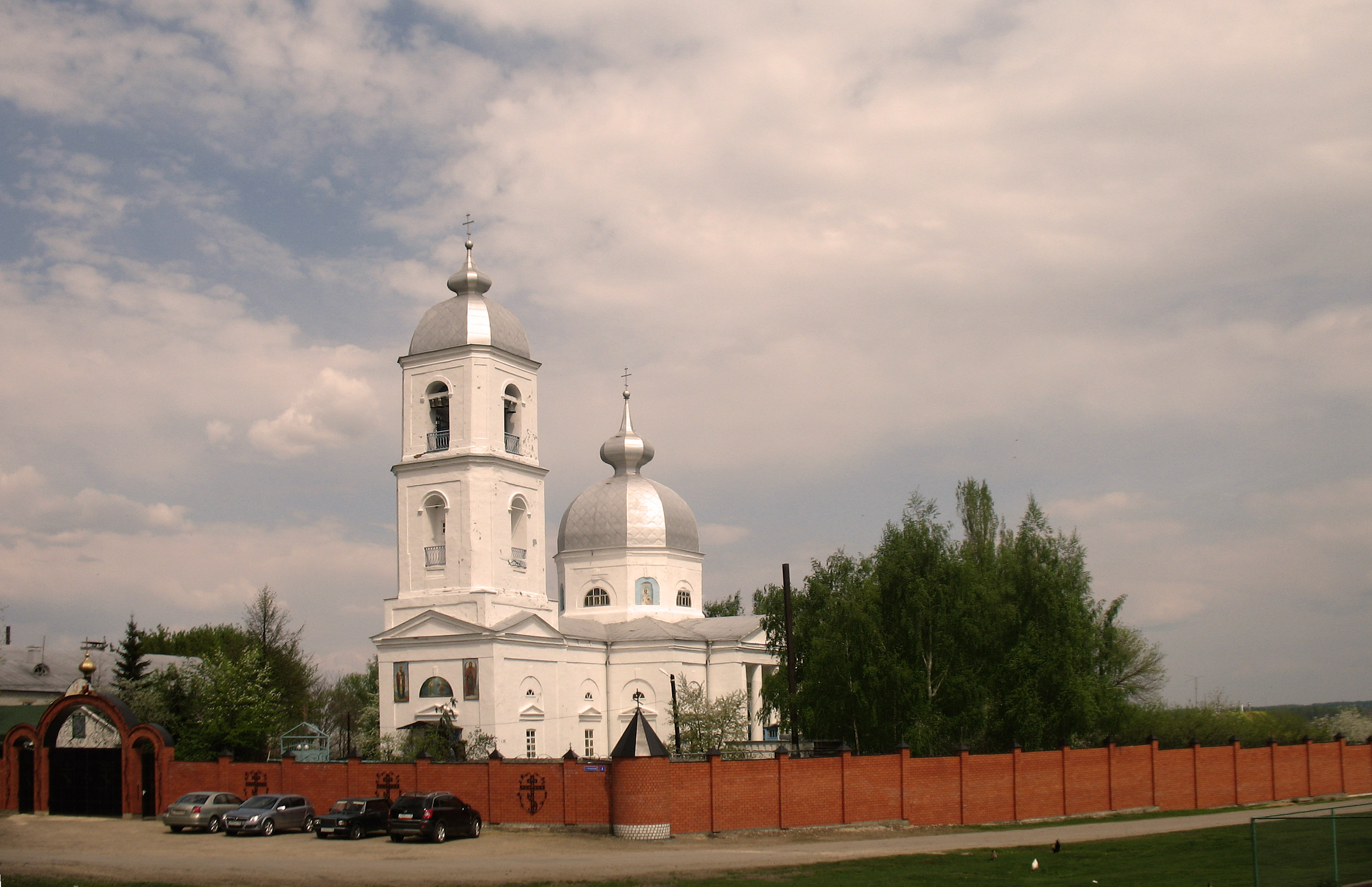 Благовещенский монастырь, Ожога (Липецкая область), 10 мая 2009 г.